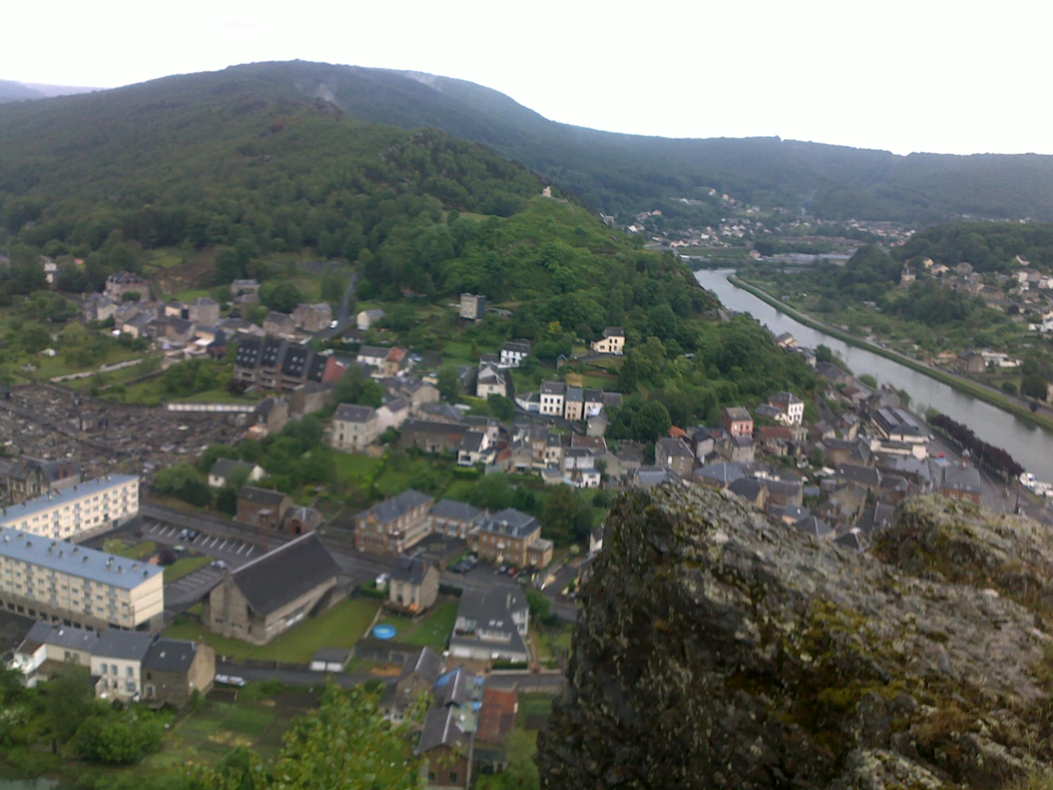 Vue de Bogny sur Meuse depuis l'Ermitage